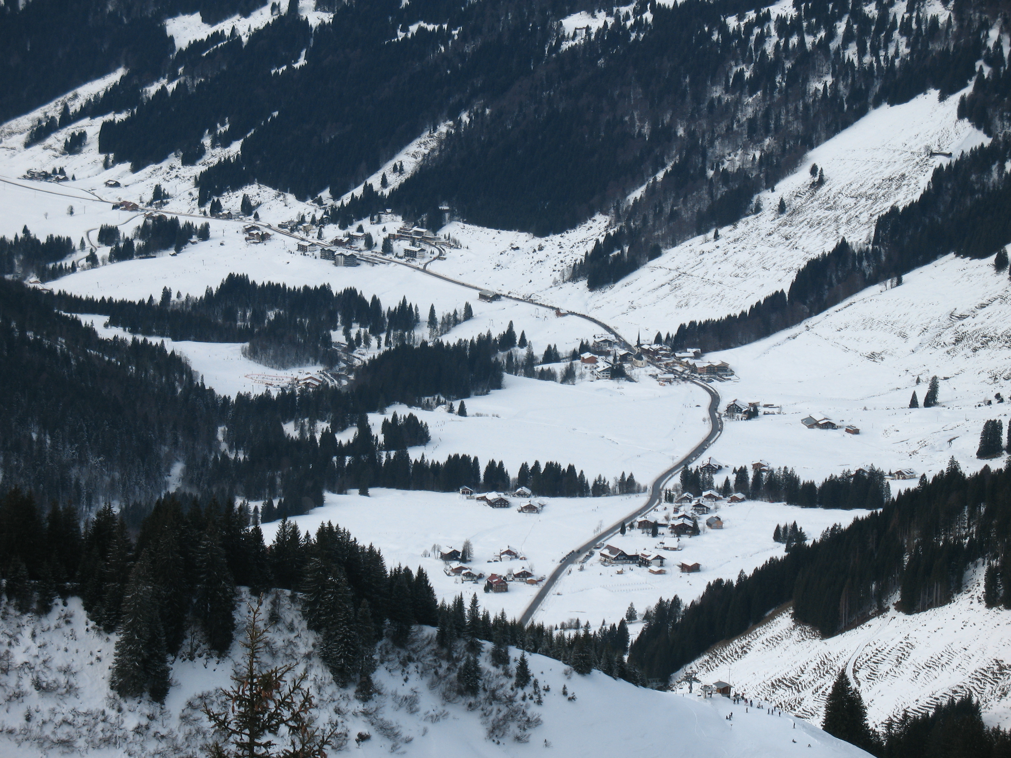 Blick vom Nordnordwest-Grat des Riedberger Horns auf Balderschwang (1044 m), im Vordergrund die Bergstation der Riedberger Horn-Bahn und Wäldle sowie links von Balderschwang Gschwend.